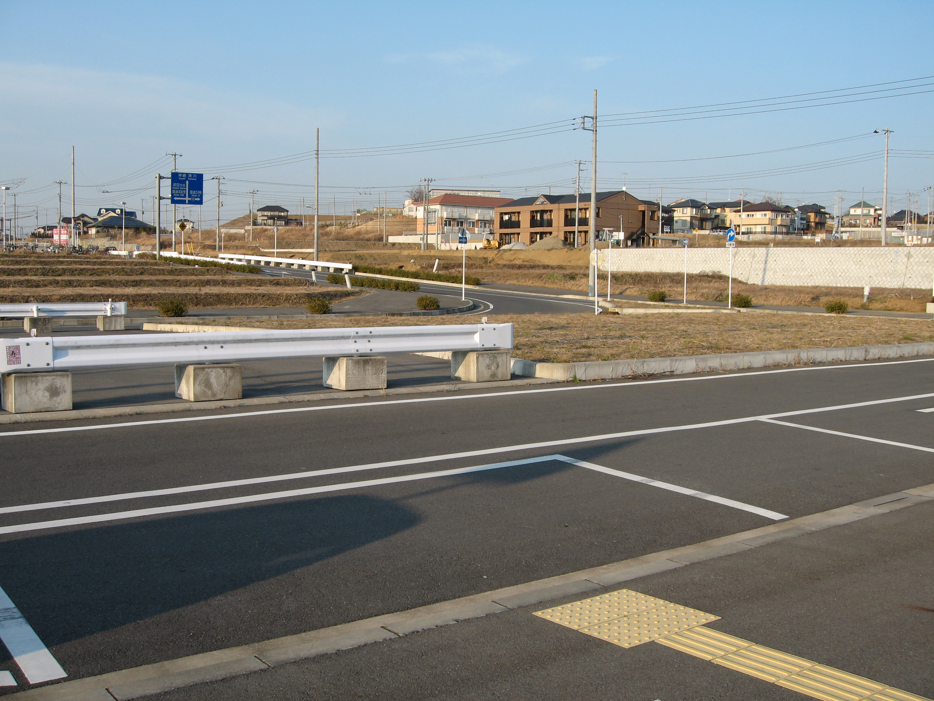 Kuzumi Station, Narita Line, Chiba, Japan, 久住駅駅前ロータリー